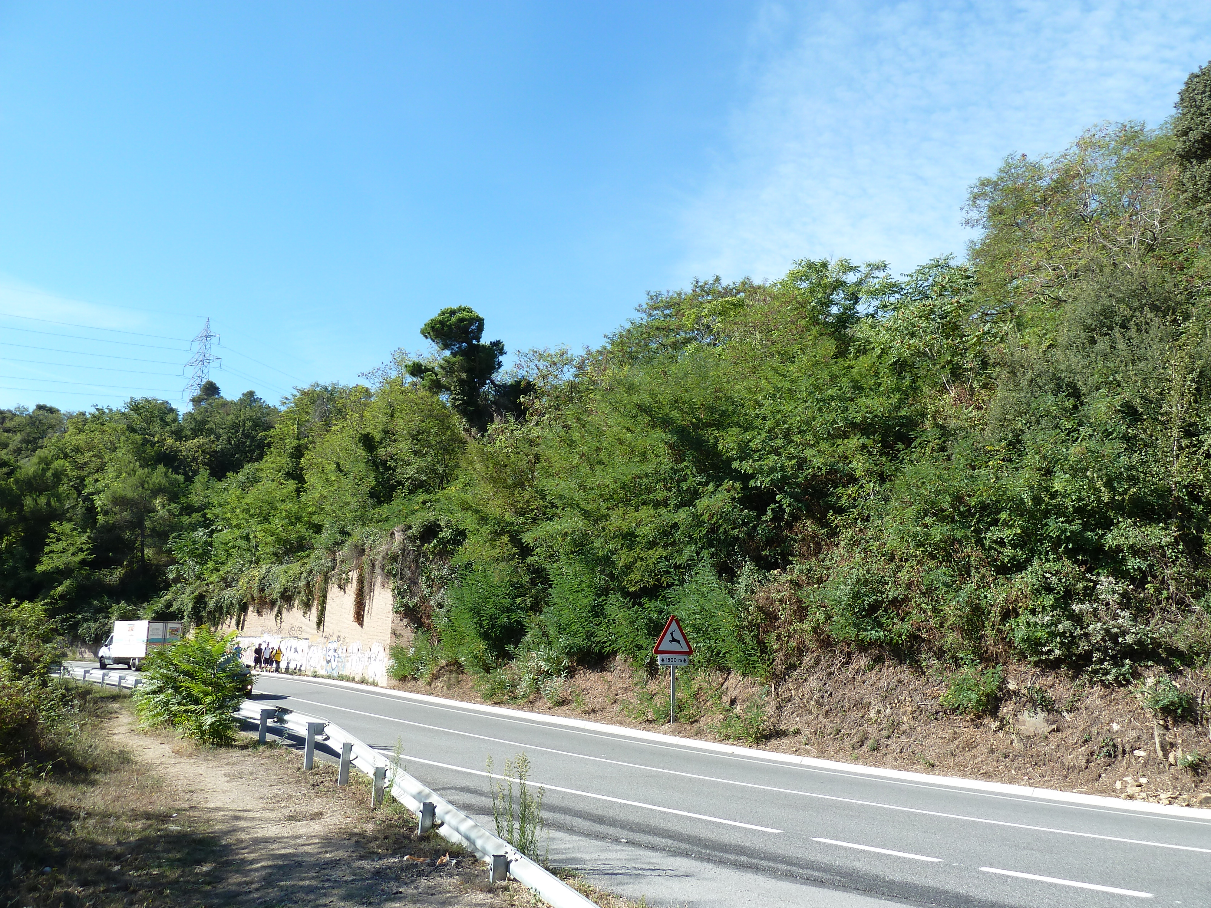 Sant Cugat del Vallès